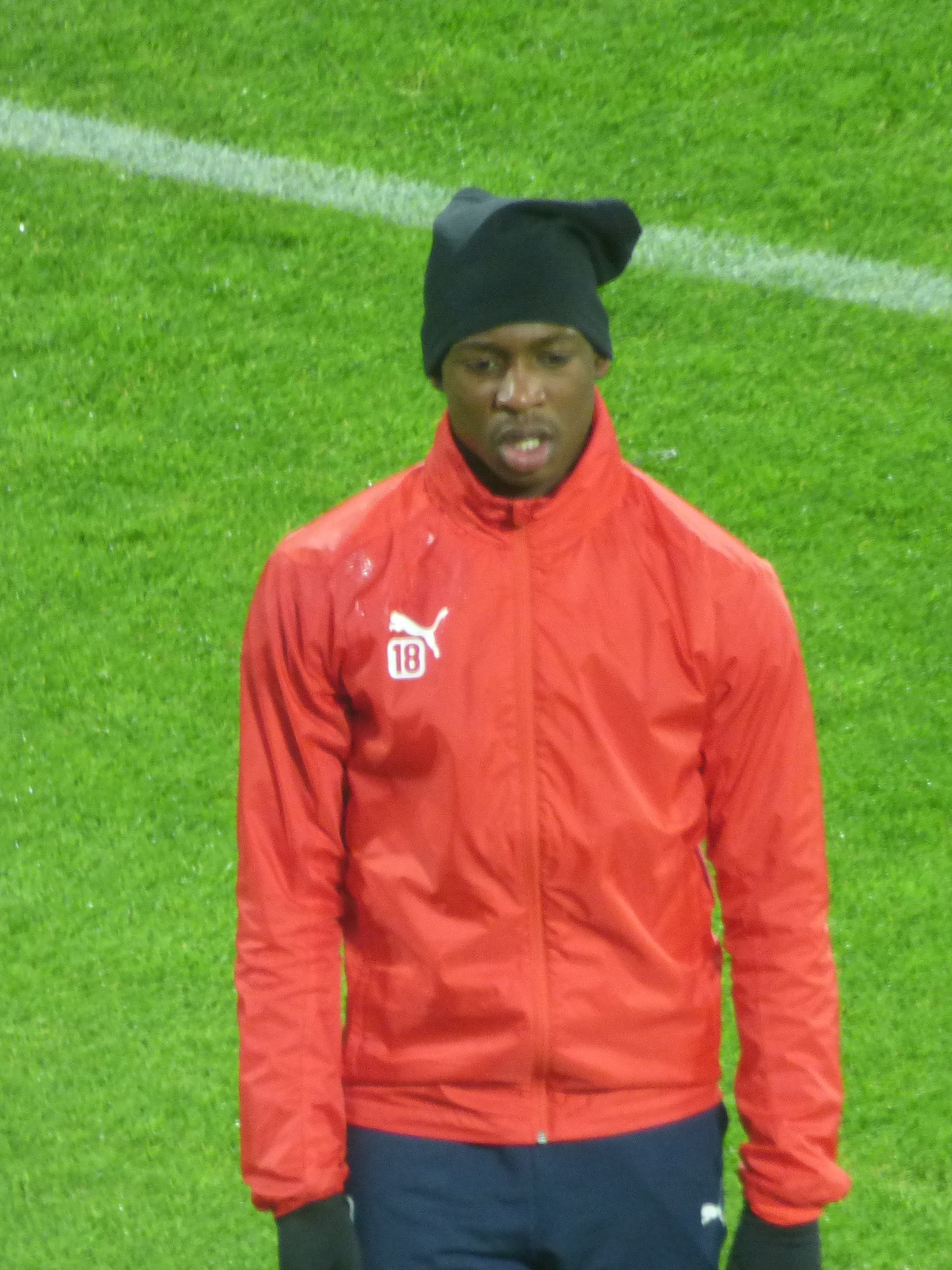 Moustapha Bokoum avant le match RC Lens / AS Béziers, comptant pour la 23ème journée du championnat de France de football de Ligue 2 2018-2019, le 4 février 2019, au Stade Bollaert-Delelis.